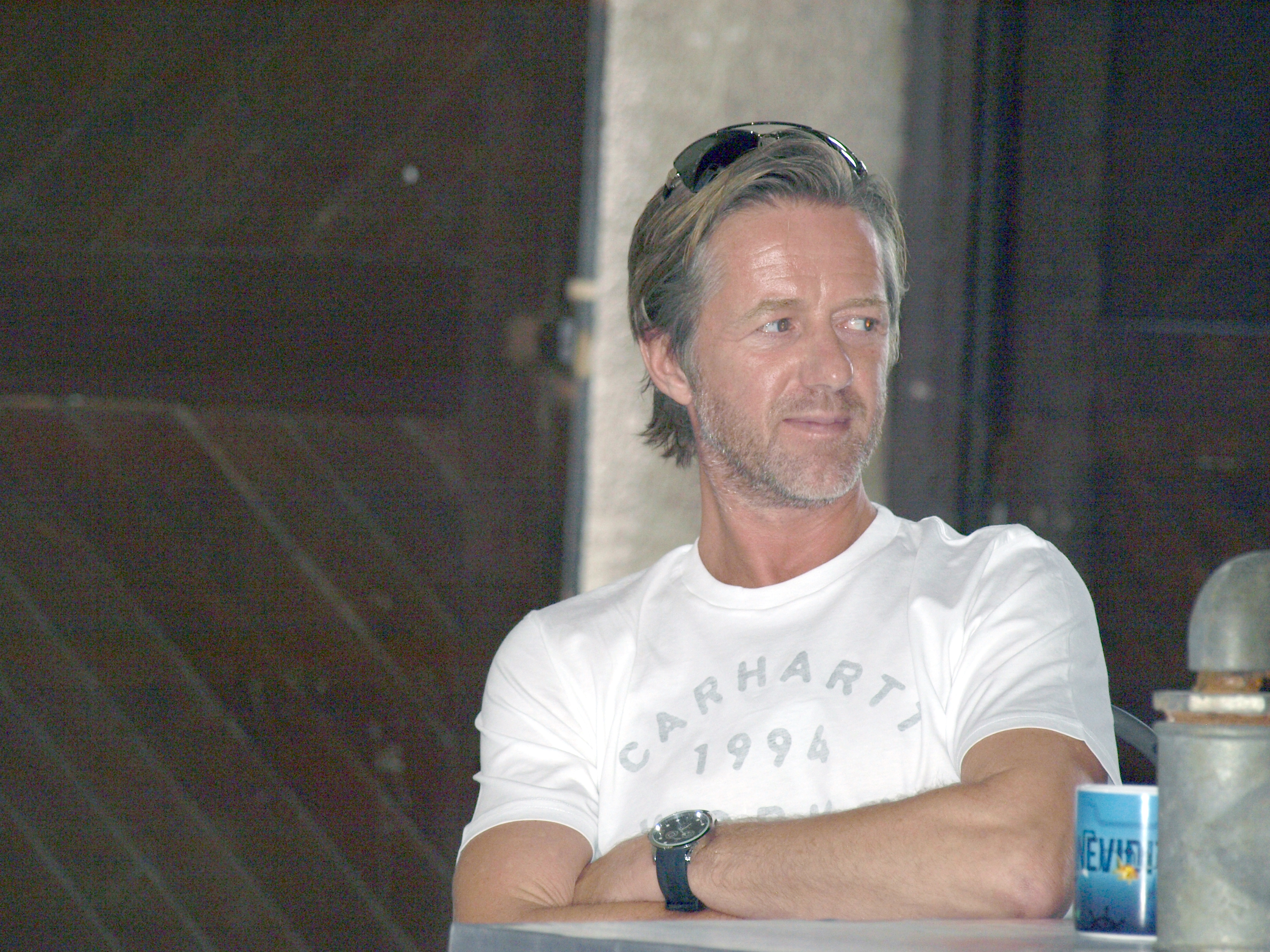 Fotky z novinářské konference z 24.7.2014- - Autor Blanka Borová pro & 10Mpix.cz